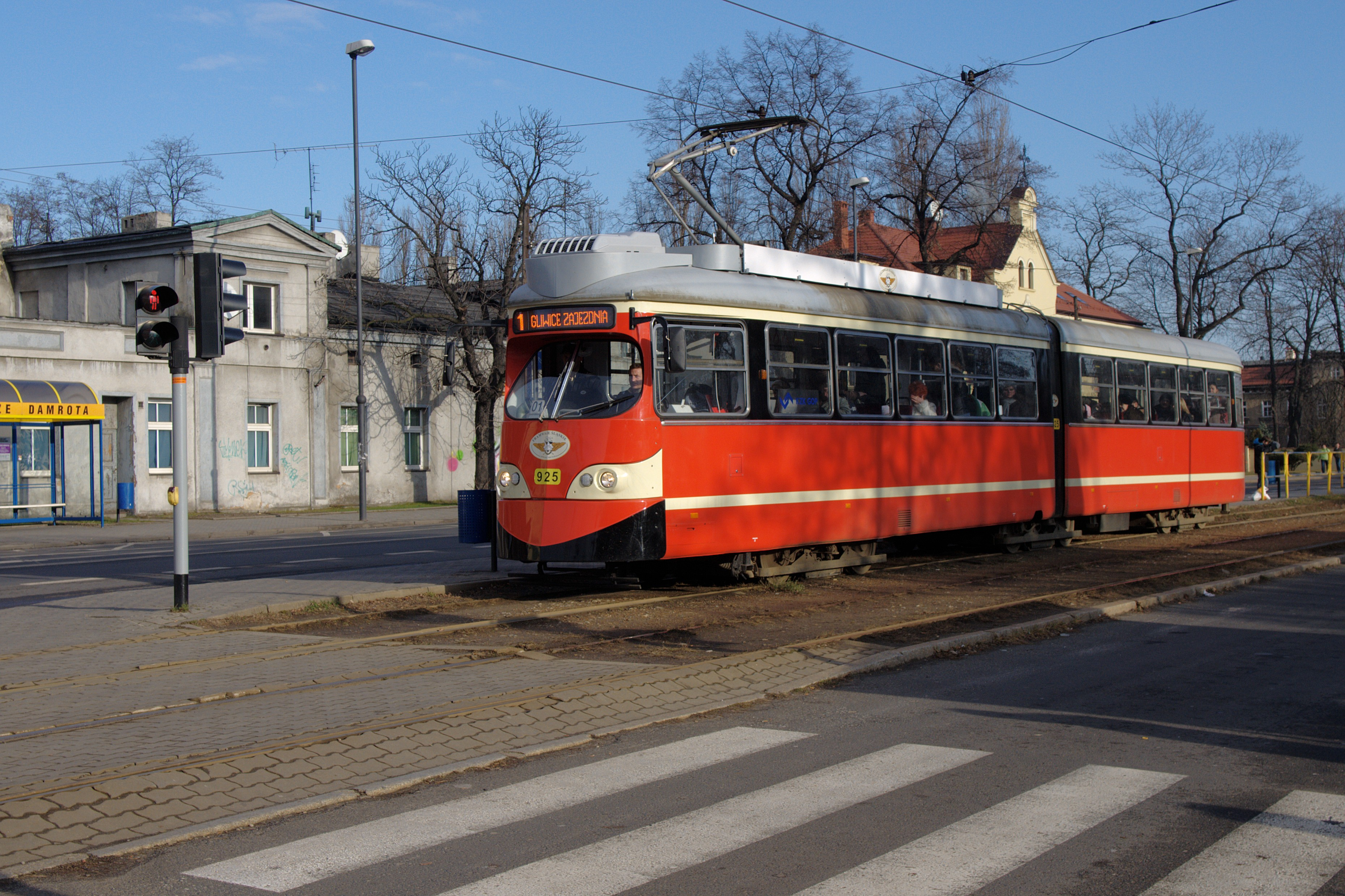 Tramwaj E1 na Wolności w Zabrzu.